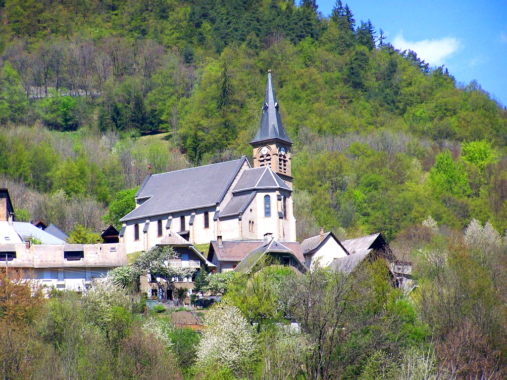 Eglise d'Allemond